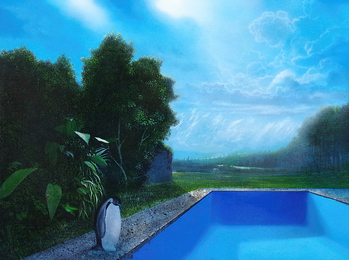 Almost Blue, Naoya Inose, 2015 materials: oil, acrylic, cobalt blue pigment, gesso on wooden panel, 30 x 40 cm